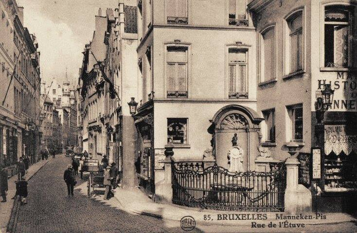 Rue de l'Etuve vers 1880